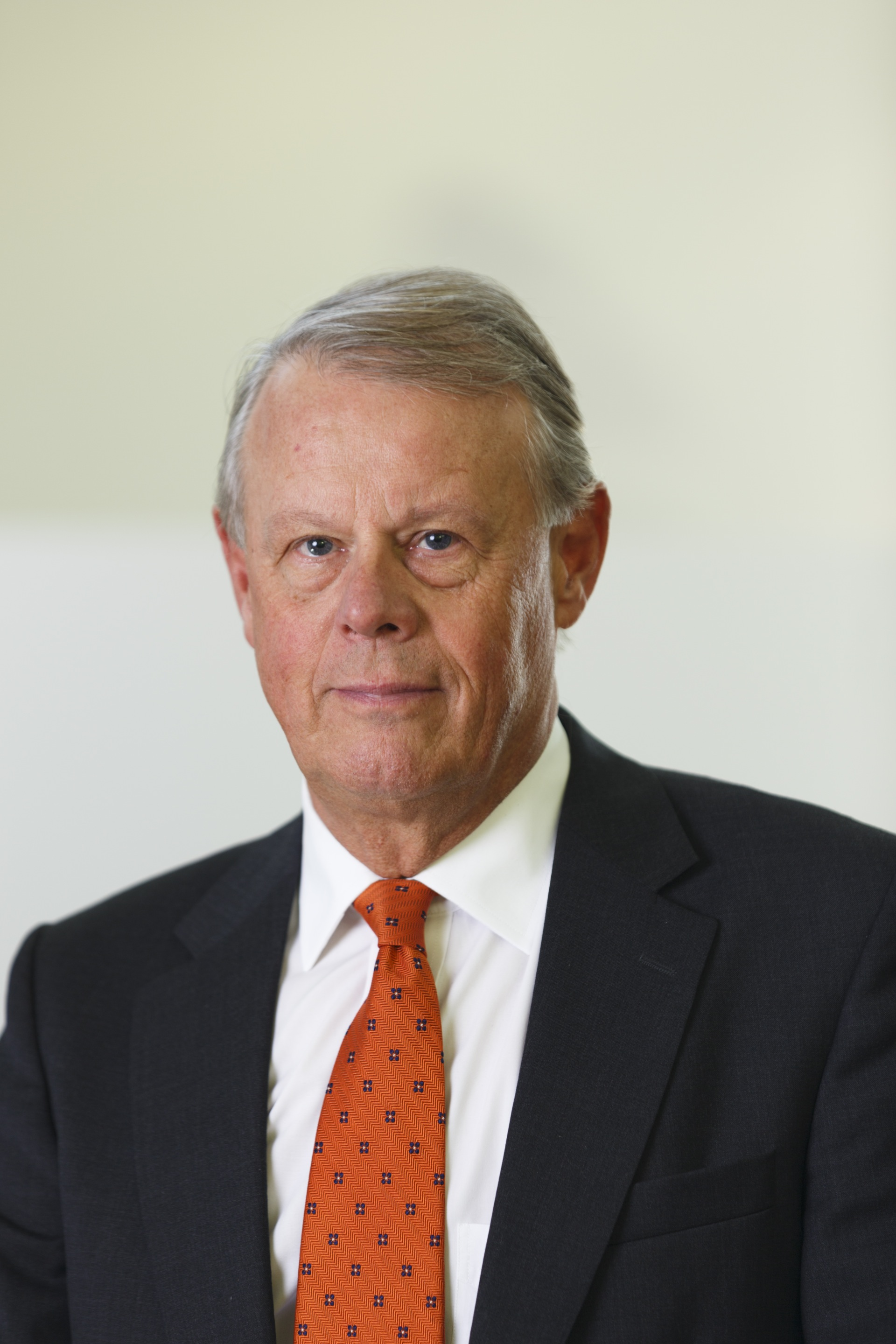 Född 13 augusti 1949 (68 år) Stockholm, Sverige Utbildning Civilekonom, Handelshögskolan i Stockholm Yrke/uppdrag Företagsledare Styrelseordförande för Höganäs